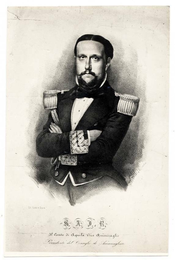 Fotografia antiga do príncipe Luís Carlos de Bourbon e Duas Sicílias, também chamado Conde de Áquila.